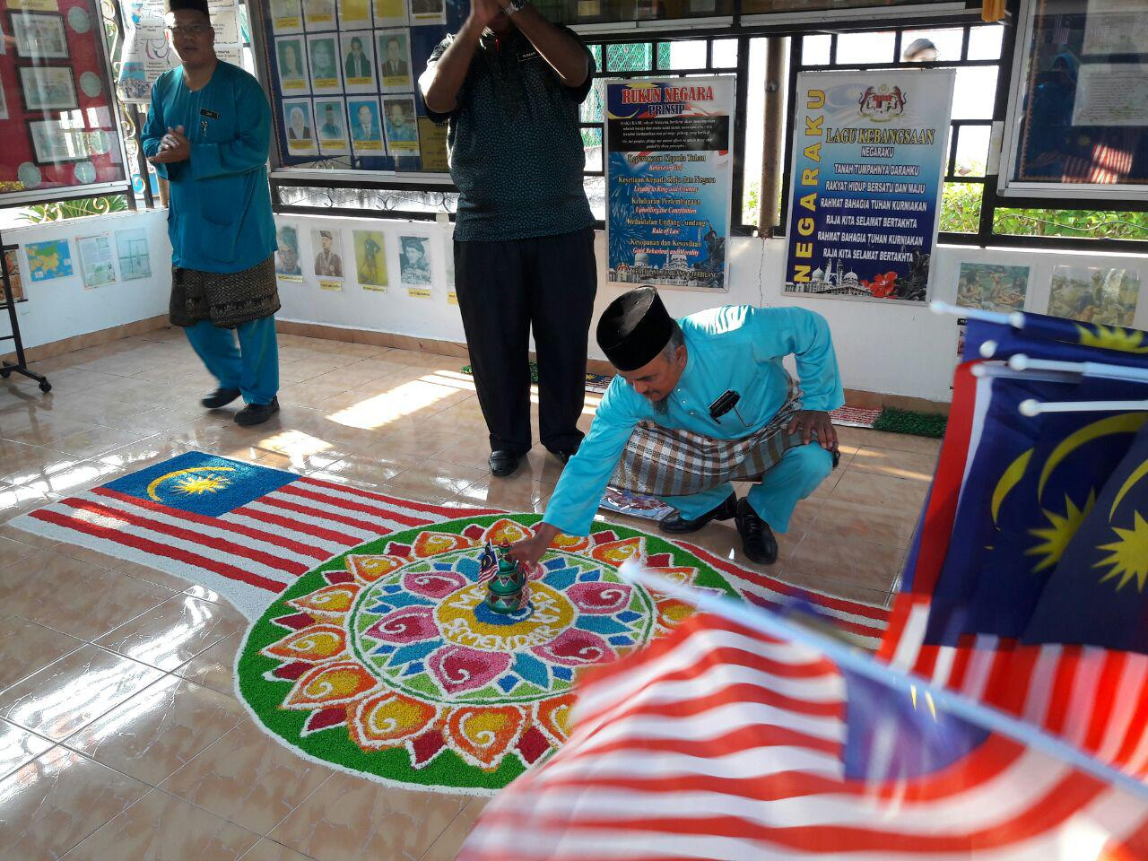 Terima Kasih kepada Guru dan Pelajar yang Telah Menghasilkan Kolem yang Menarik